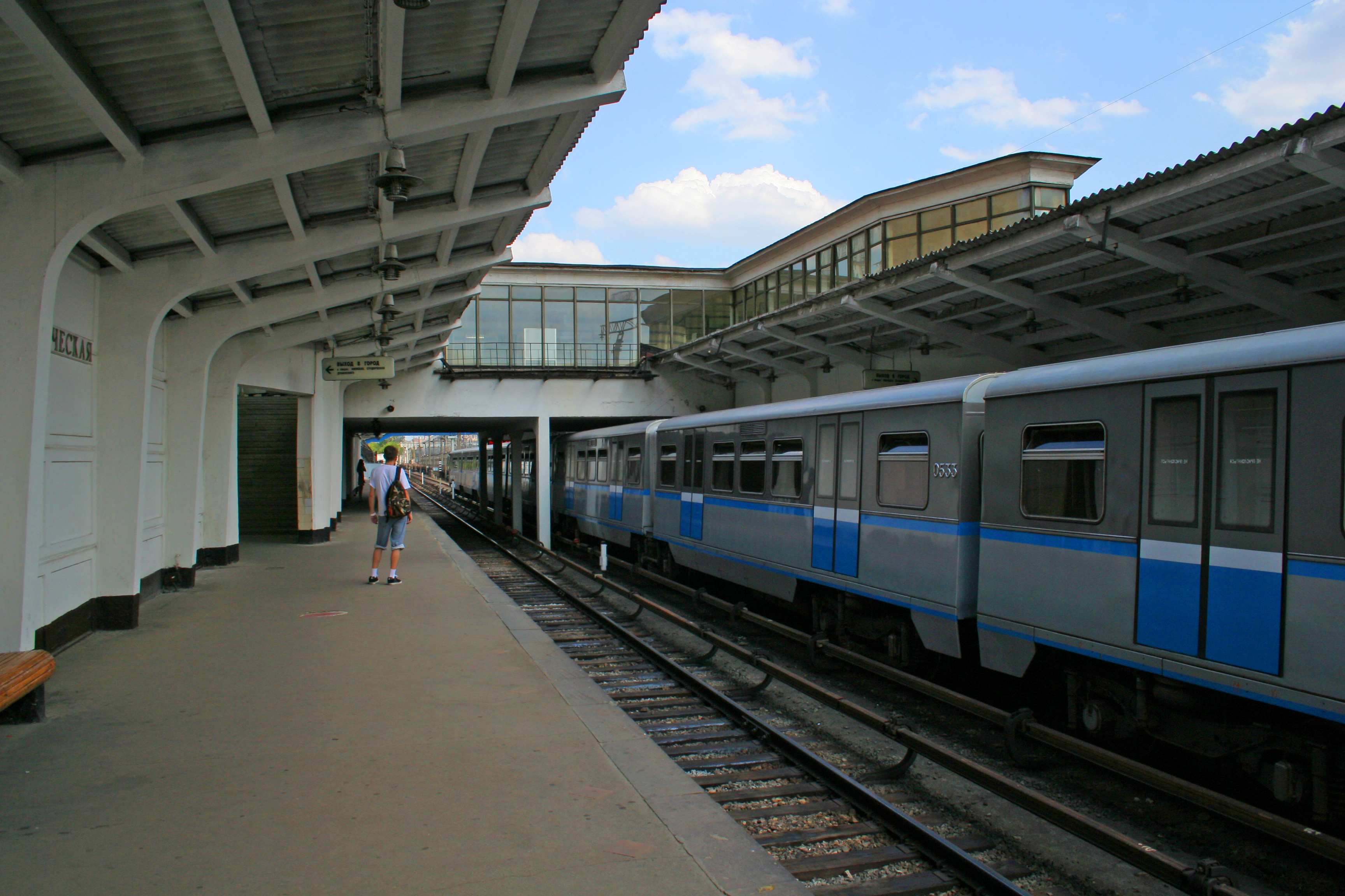 U-Bahnhof Studentscheskaja der Metro Moskau